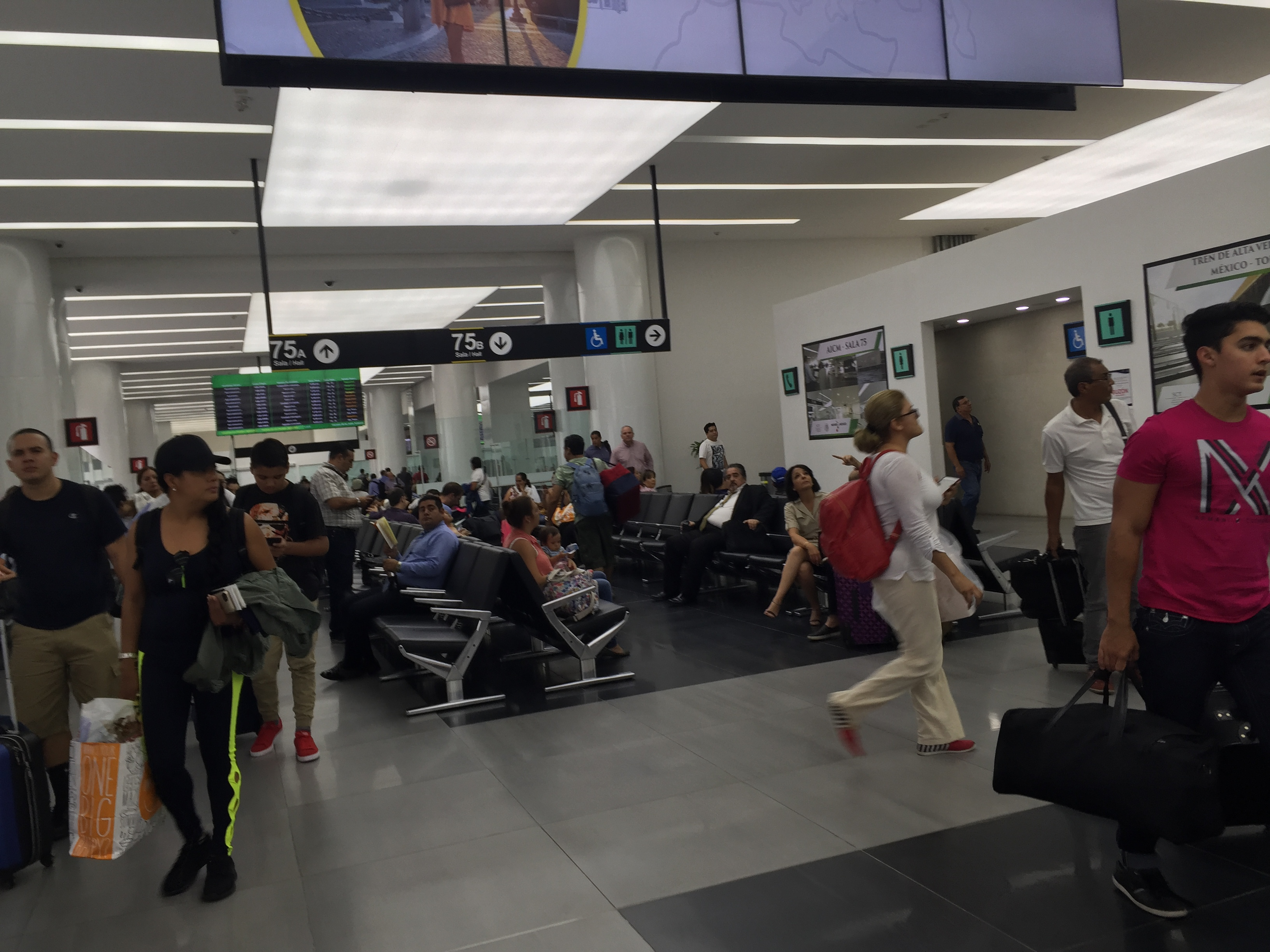 Nueva Sala 75 de la Terminal 2 del Aeropuerto Internacional de la Ciudad de México.